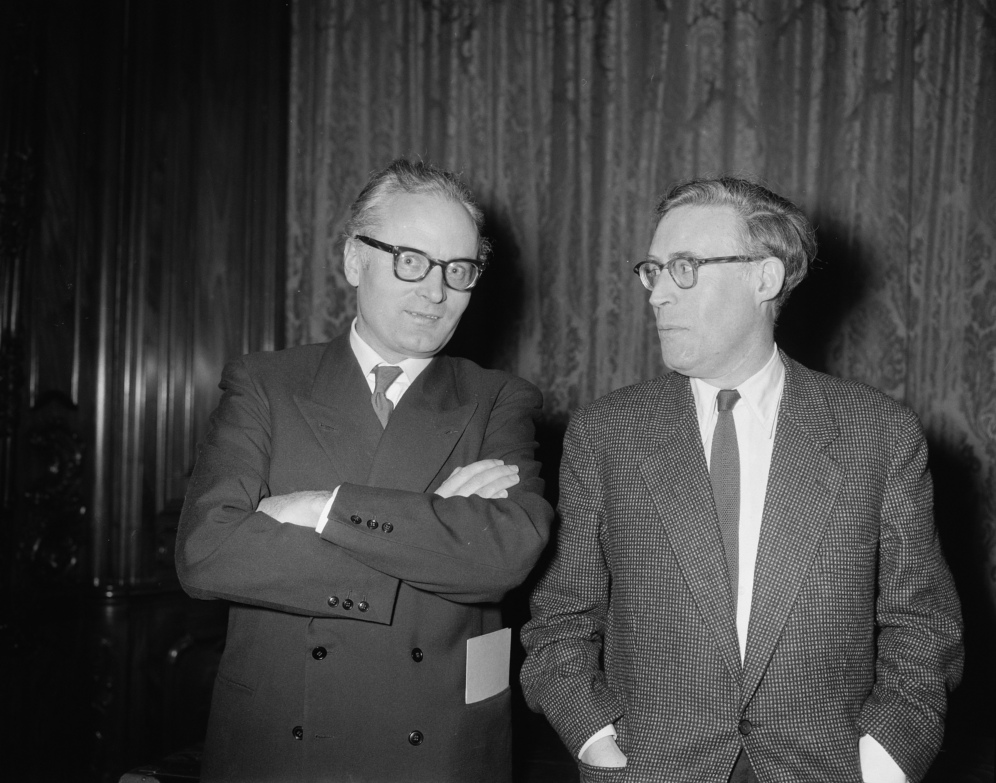 Prijsuittreiking kunstenaarsverzet 42-45. Han G. Hoekstra (rechts literatuur) prof. V. P. S. Esser (links beeldende kunst) Datum 17 februari 1957